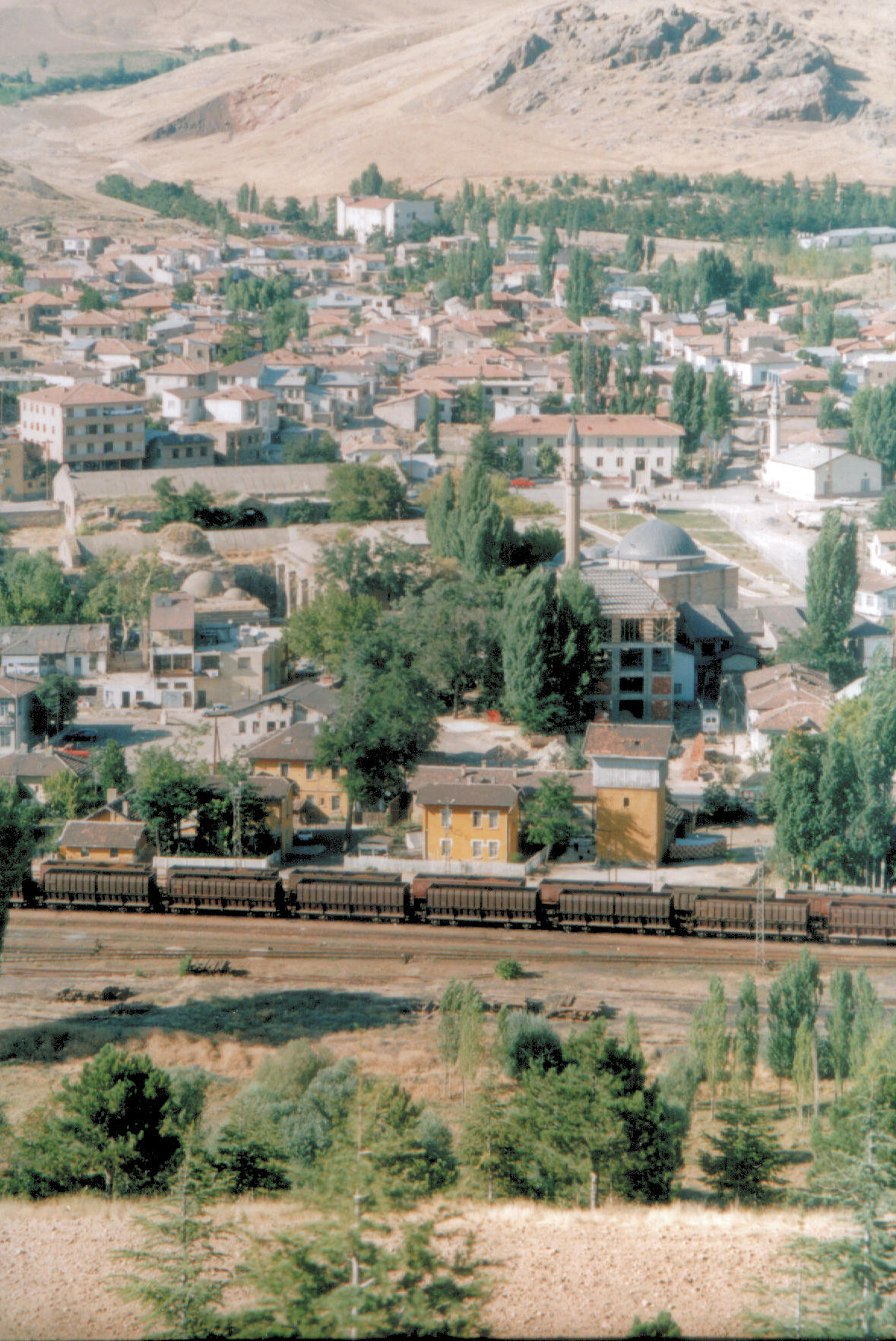 Ulukışla, Niğde in Turkey